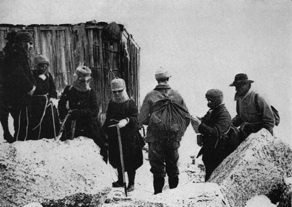 Le refuge du Goûter datant 1858-1859 et restauré en 1882